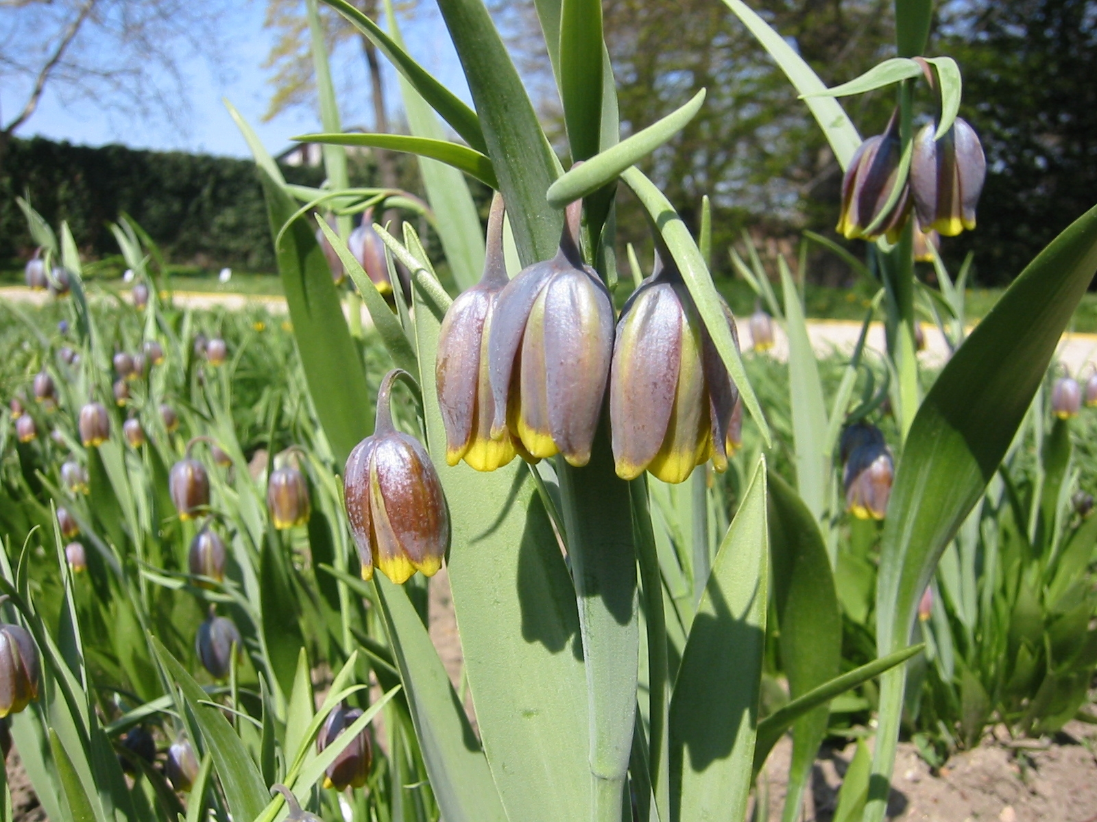 Fritillaria uva-vulpis; Botanic Garden, Vienna, Austria.